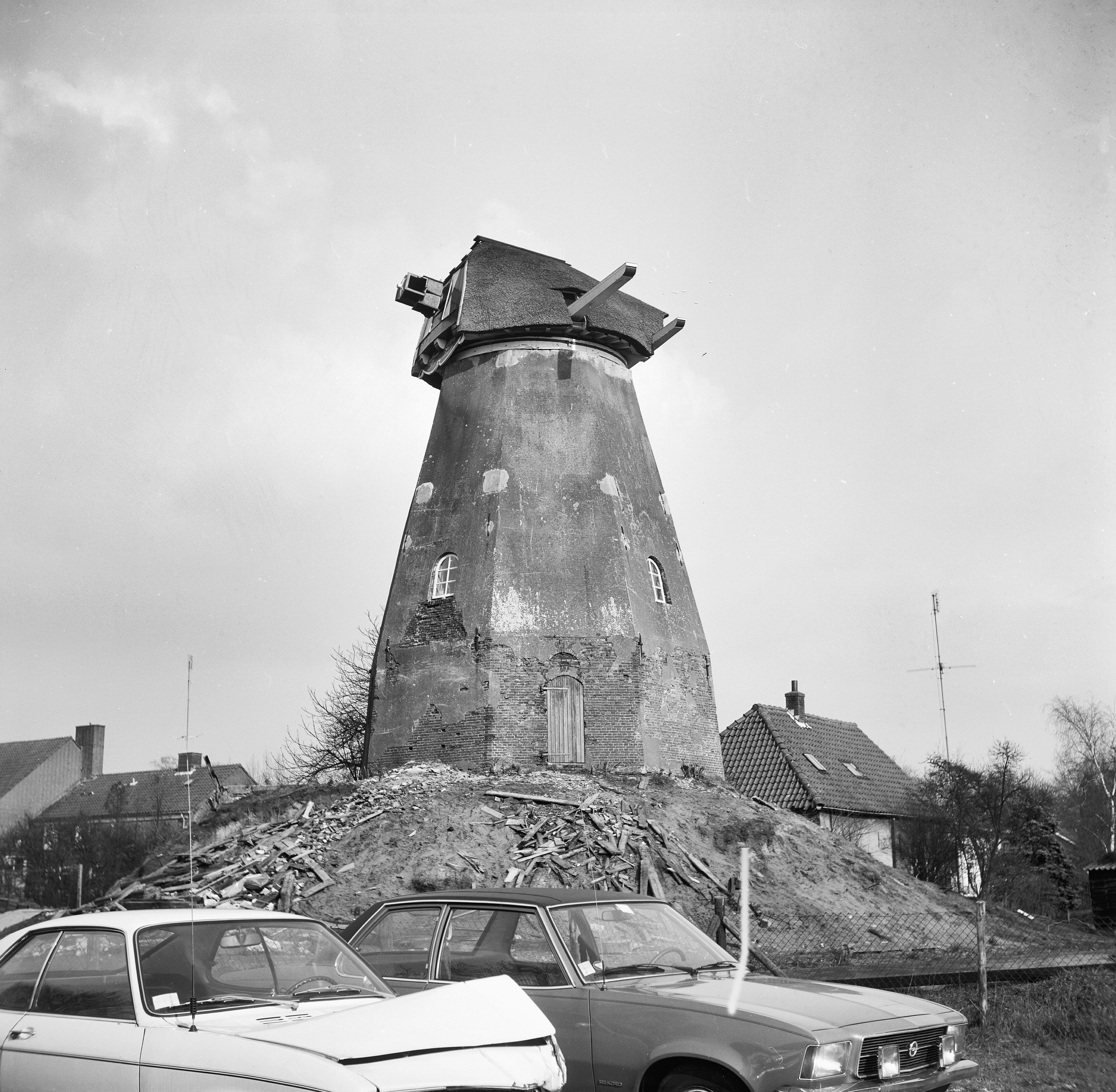 Diversen: "De Keetmolen"